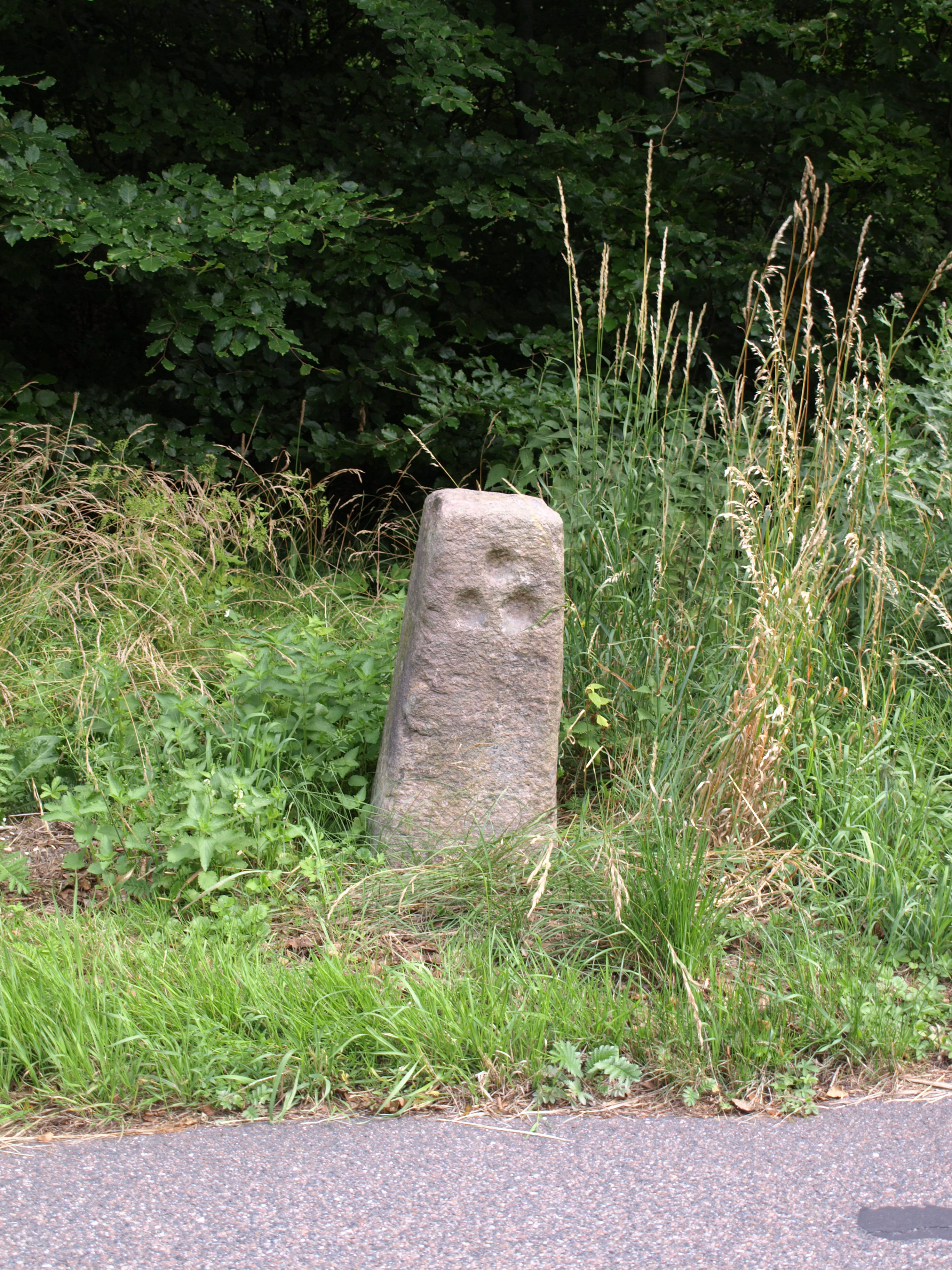 Trekvartmilesten af granit fra Ole Rømers opmåling. På Kongevejen mellem Hillerød og København lidt syd for Hillerød.